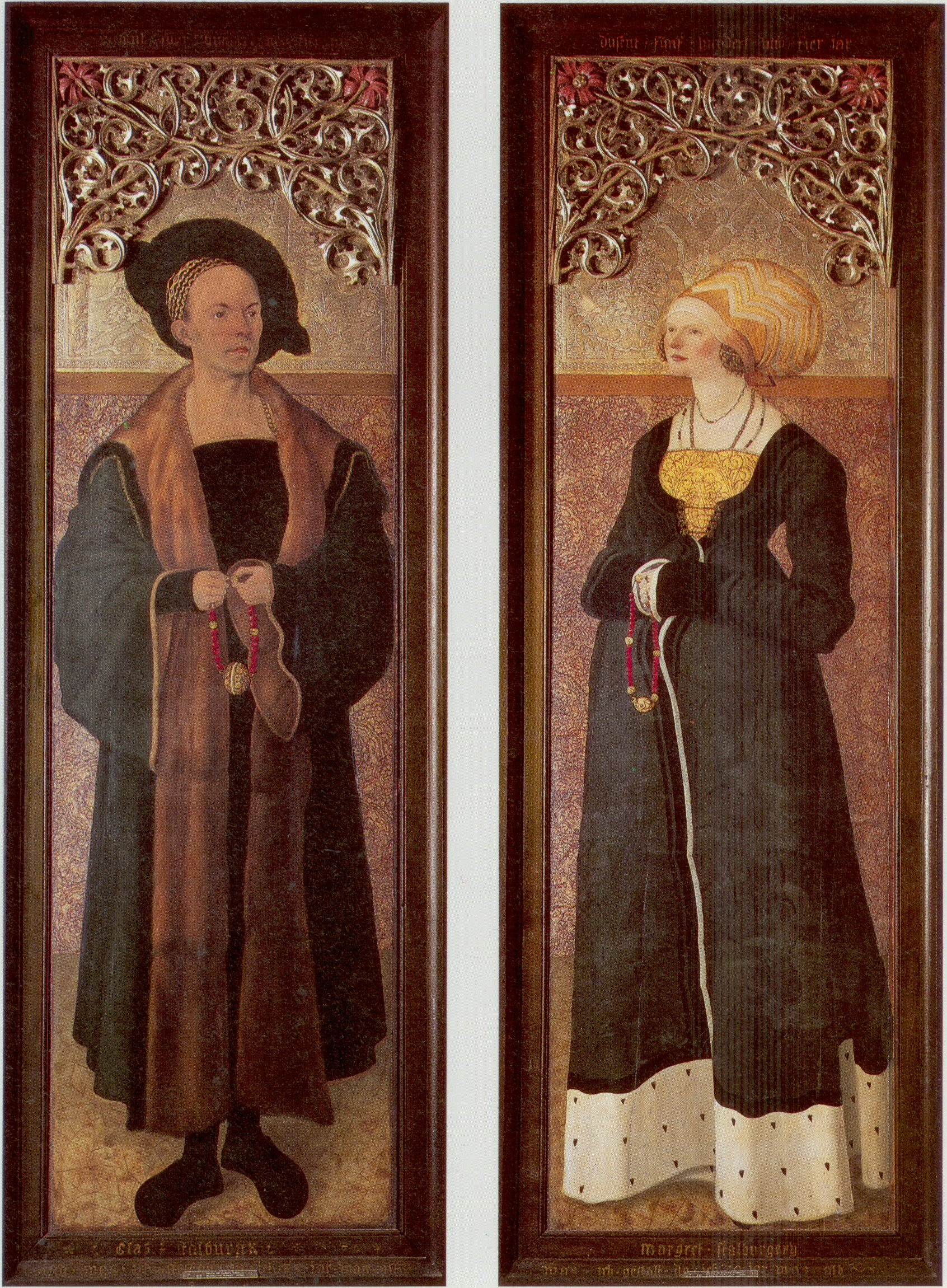 Stifterbild des Frankfurter Patriziers Claus Stalburg des Reichen (1469-1524) und seiner Frau Margarethe vom Rhein